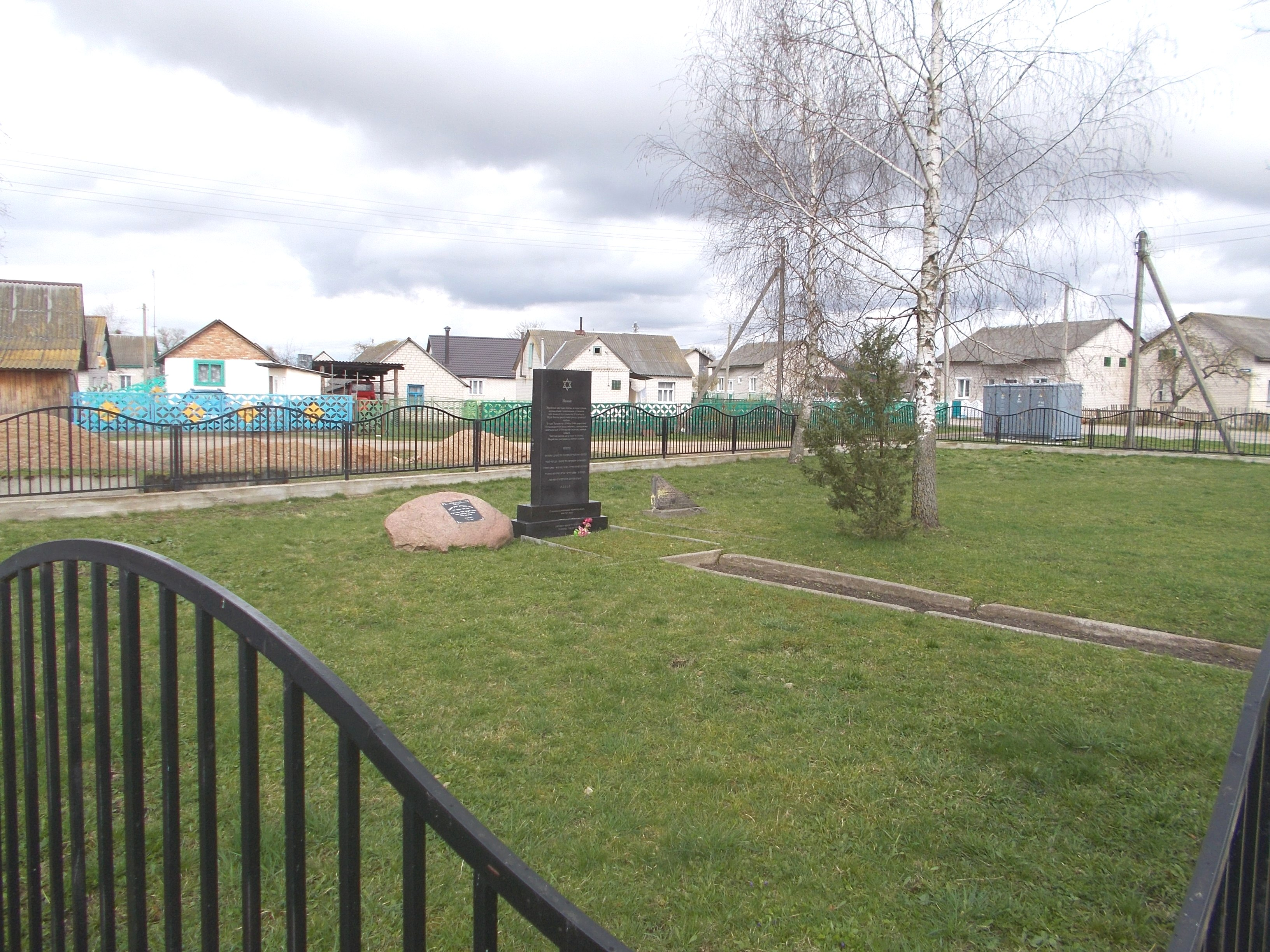 Стела на месте бывшего еврейского кладбища в поселке Любча Новогрудского района Гродненской области в память о 1500 местных евреях, убитых нацистами во время Холокоста. Находится на пересечении улицы Протасени и 1-го переулка Ленина.